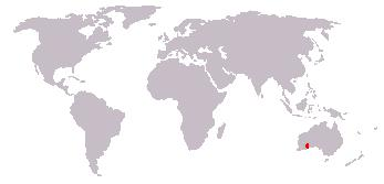 Leefgebied numbat